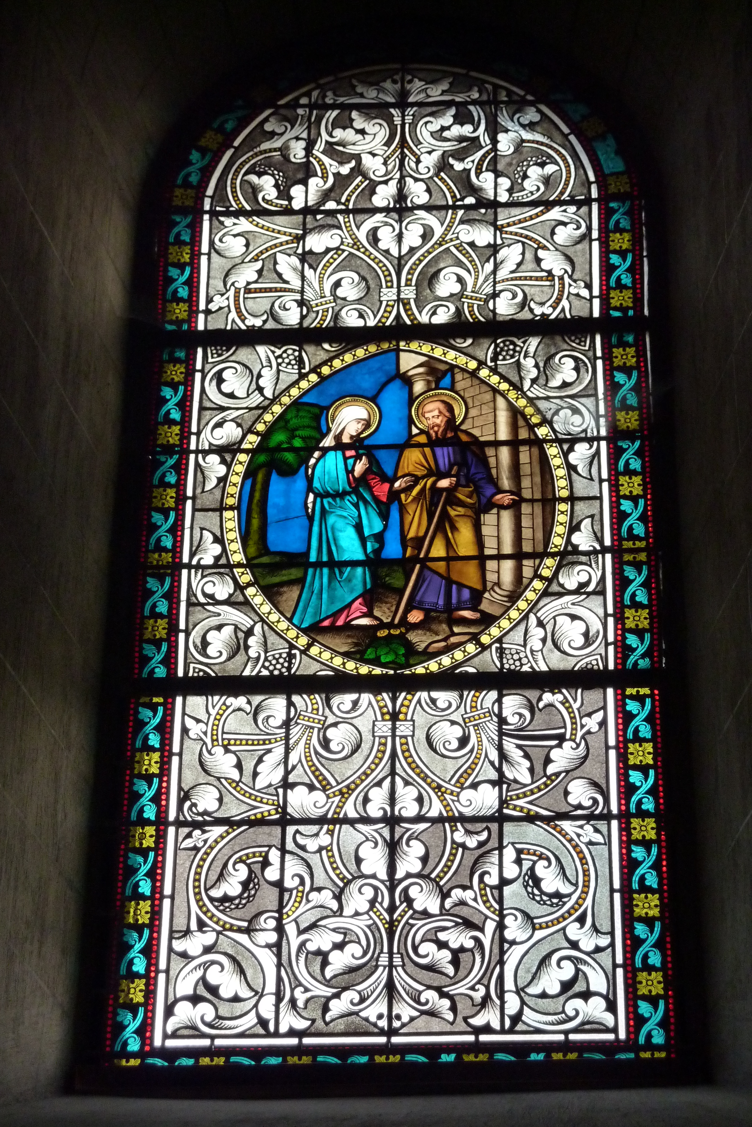 Bleiglasfenster in der Kreuzkapelle in Kempenich, Darstellung: Maria und Joseph